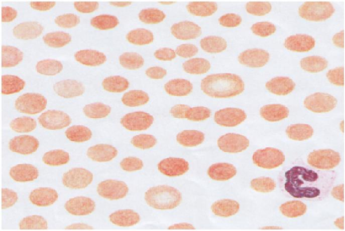 Тума микросфероциоз (гемограмма)